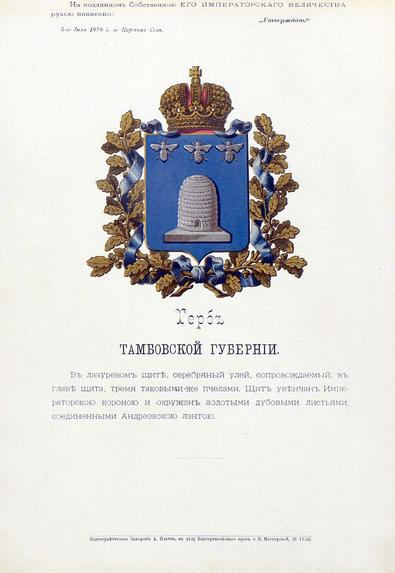 Official Russian Empire coat of arms Tambov Governorate. Герб Российской Империи Тамбовской губернии с официальным описанием в Гербовнике Бенке. Утверждён Императором Всероссийским Александром Вторым.